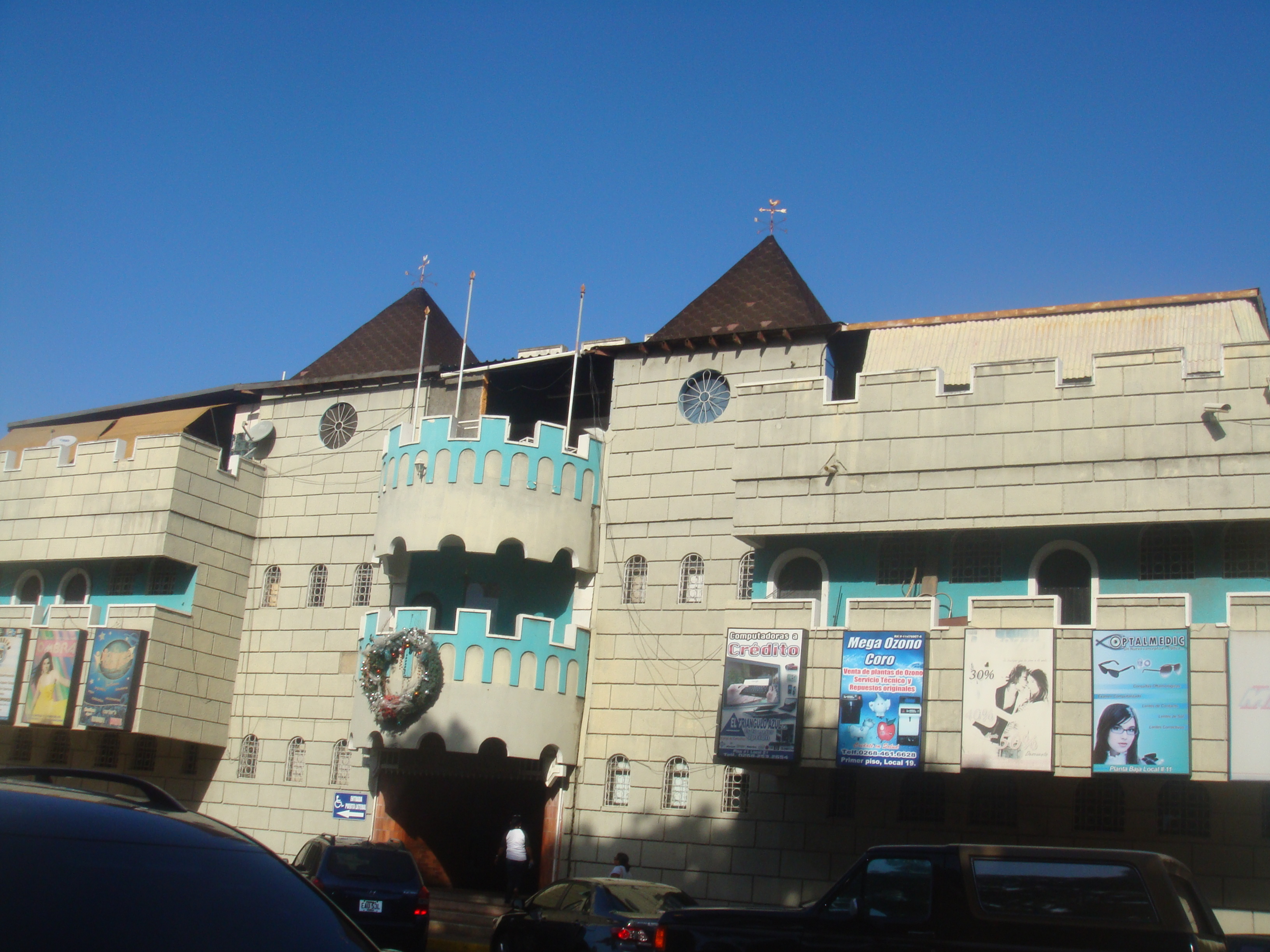 Coro punto fijo